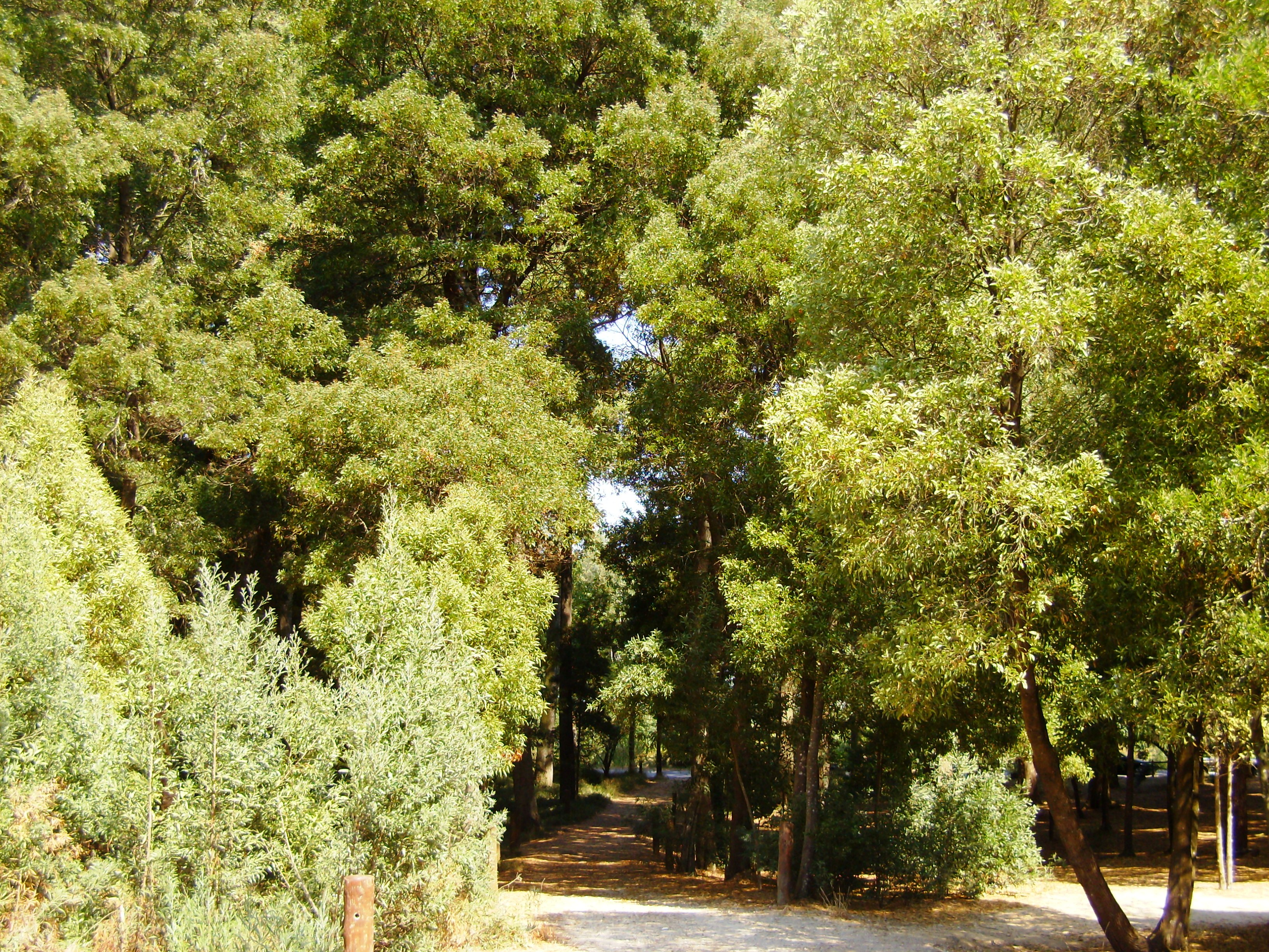 Parque do Buçaquinho, Mata do Buçaquinho, Cortegaça, concelho de Ovar, distrito de Aveiro, Portugal.